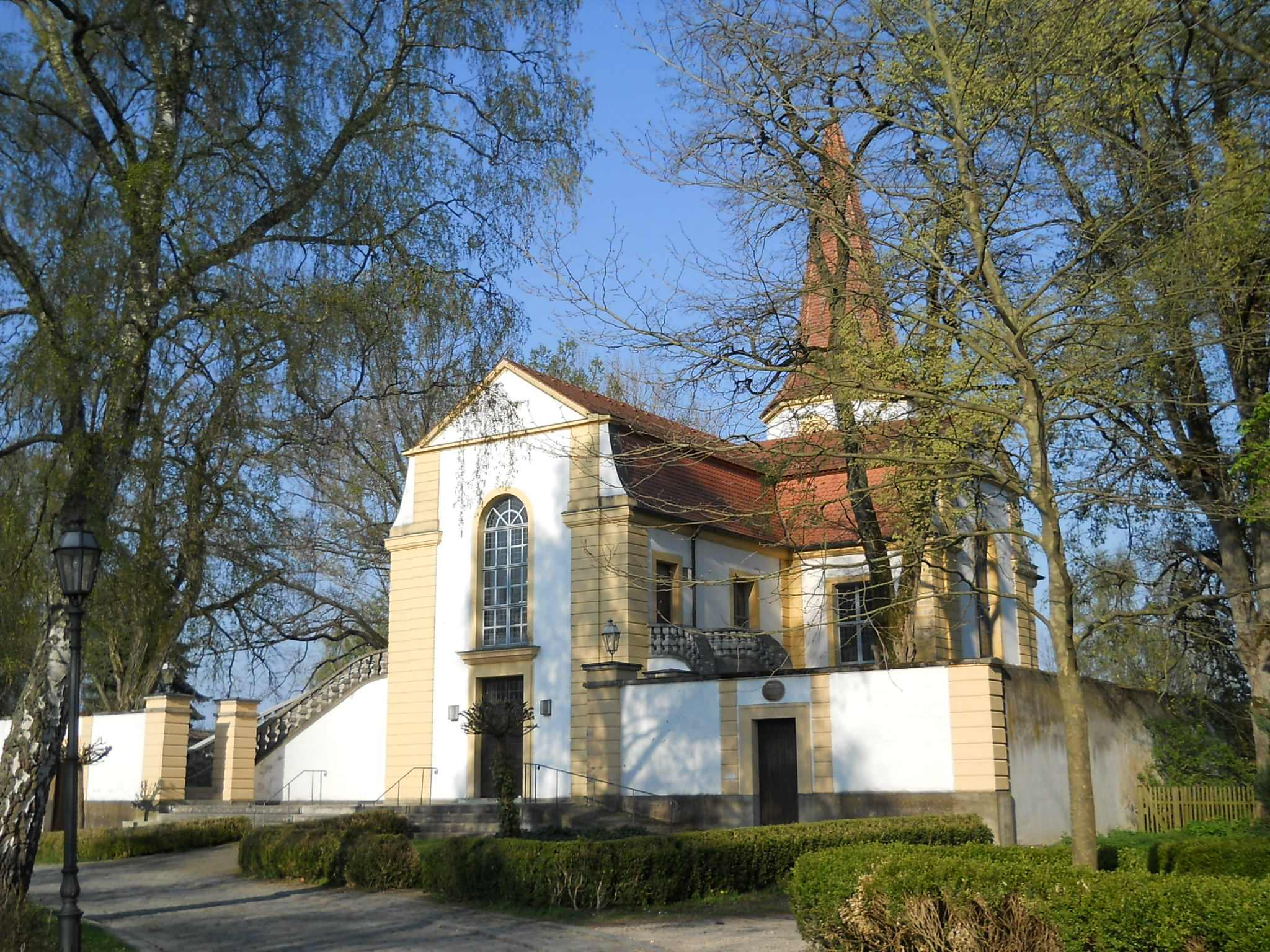 Kirche St. Martin und Ägidius in Wald im Landkreis Weißenburg-Gunzenhausen, Bayern